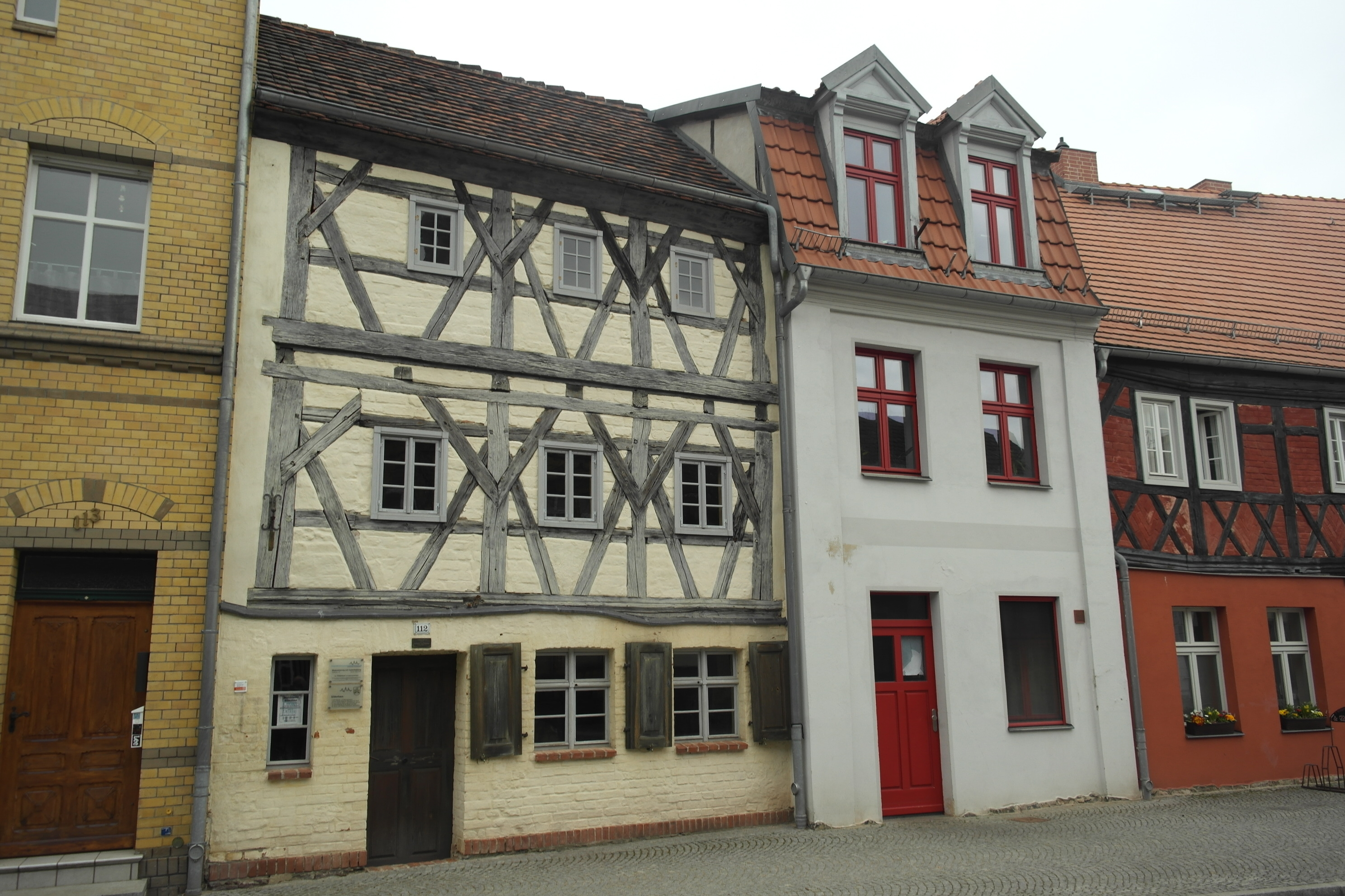 Denkmalgeschützte Wohnhäuser Großstr 111/112 in Treuenbrietzen